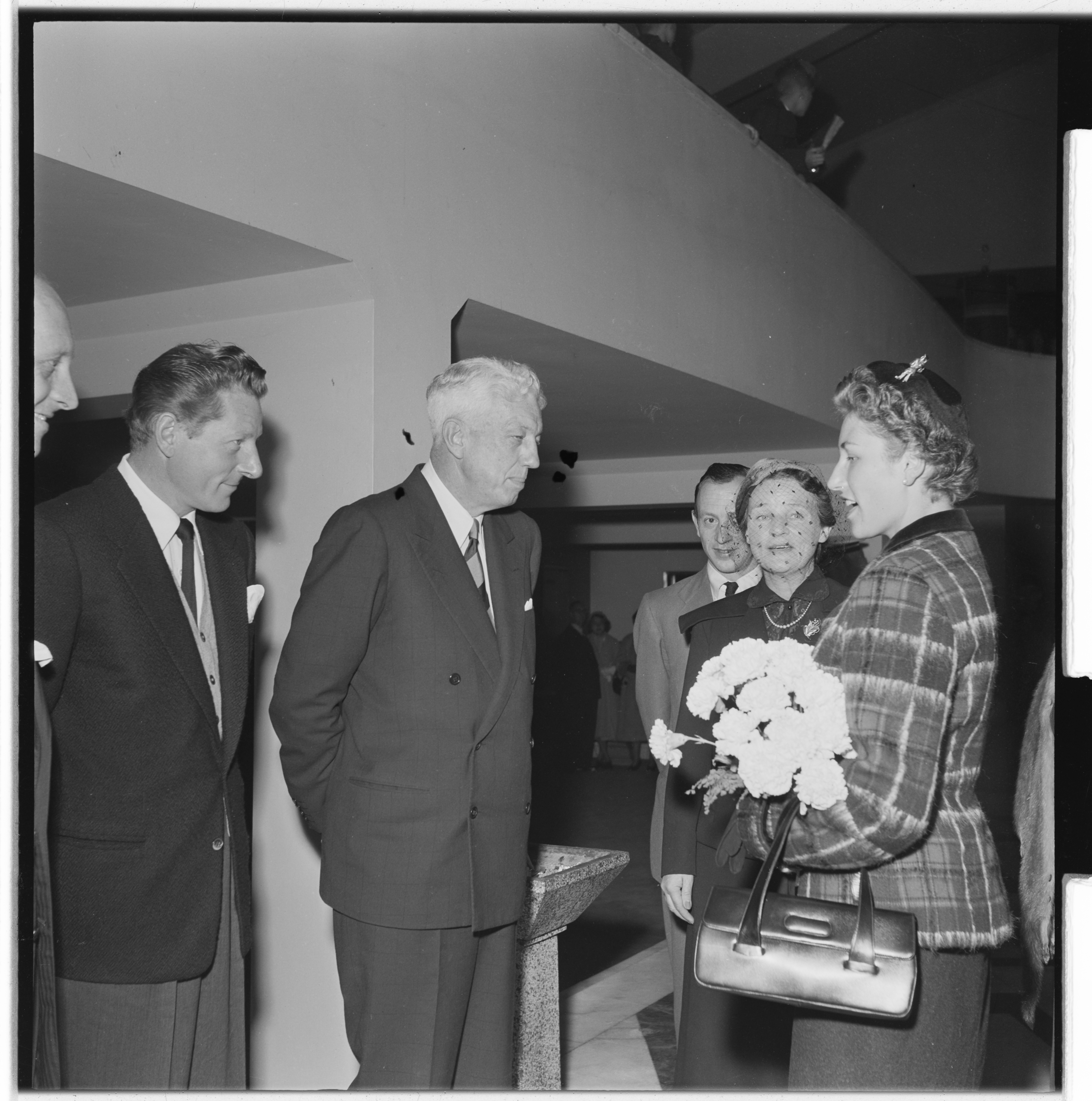 Bildet er hentet fra Arkivverket. Danny Kaye Arkivinstitusjon : Riksarkivet Arkivnavn : Billedbladet NÅ Sted : Norge, Ukjent, Ukjent, Avbildet: Kaye, Danny